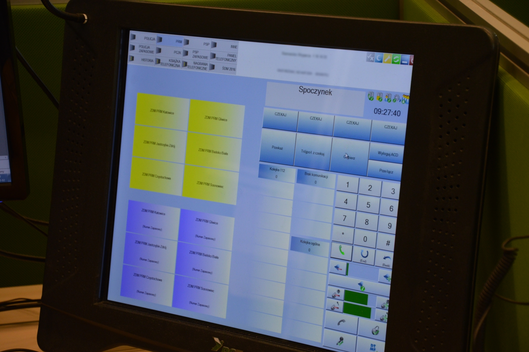 Centrum Powiadamiania Ratunkowego w Katowicach